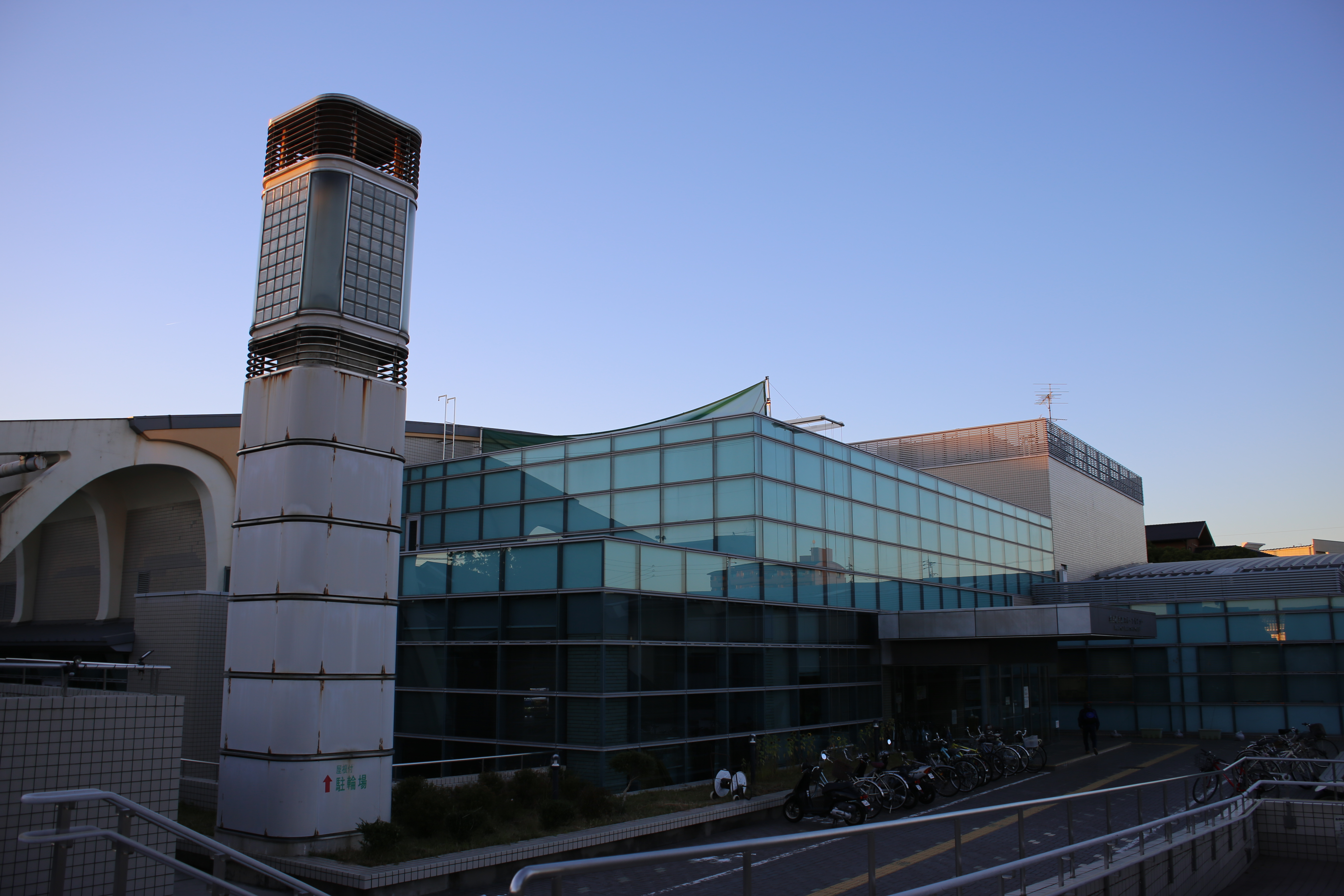 名古屋市緑区相原郷一丁目の名古屋市緑スポーツセンターを南側公道東側より撮影